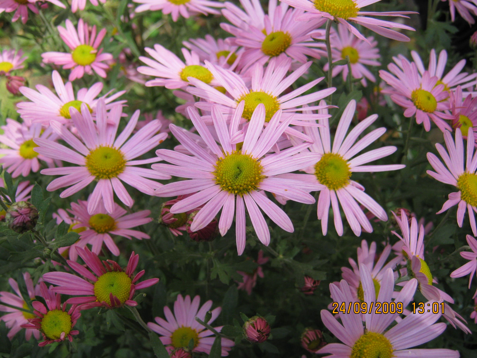 Matricaria